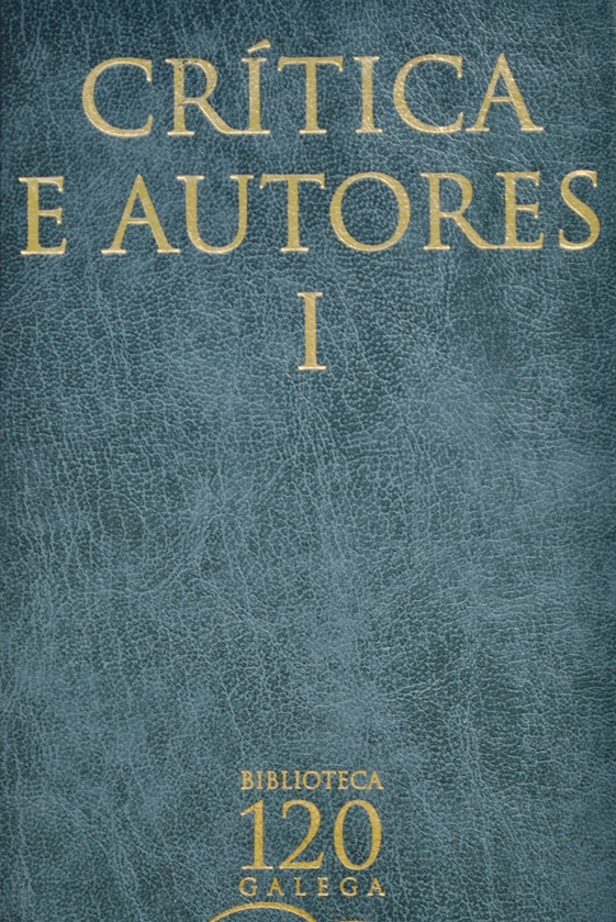 Detalle da portada dun volume de Crítica e autores I, da Biblioteca Galega 120. ISBN 84-9757-097-9.